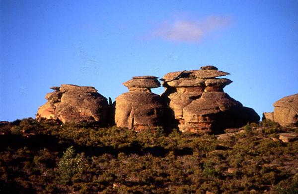 Fotografía Comarca del Jiloca - Piedras de rodeno coronando los montes de Peracense